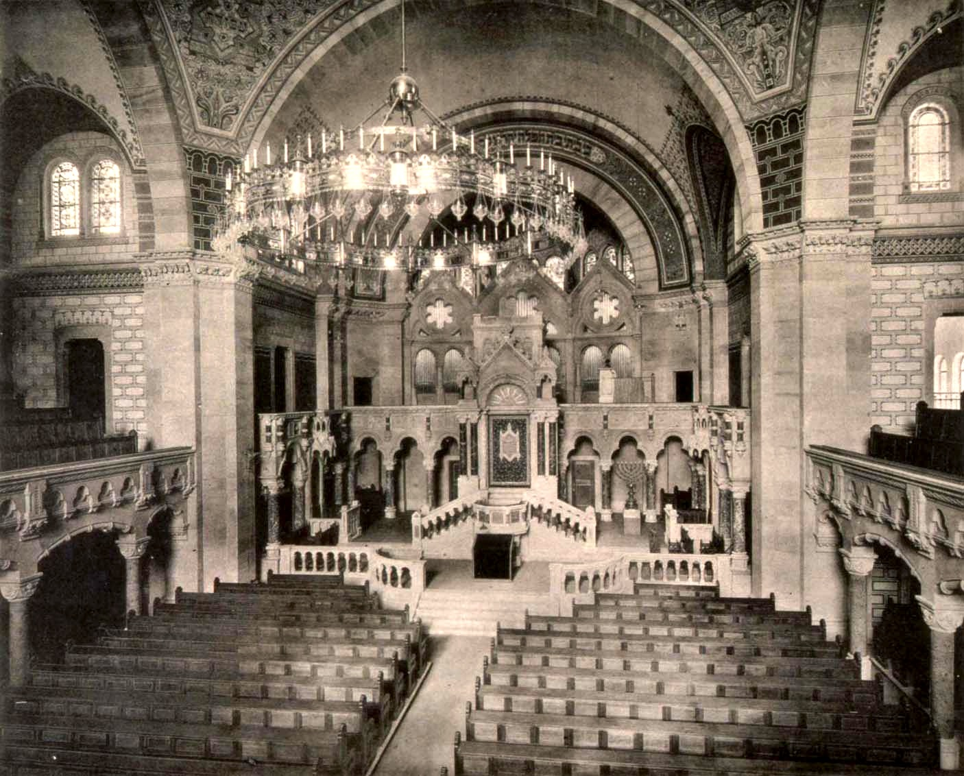 L’intérieur de Synagogue consistoriale du quai Kléber 1898-1940